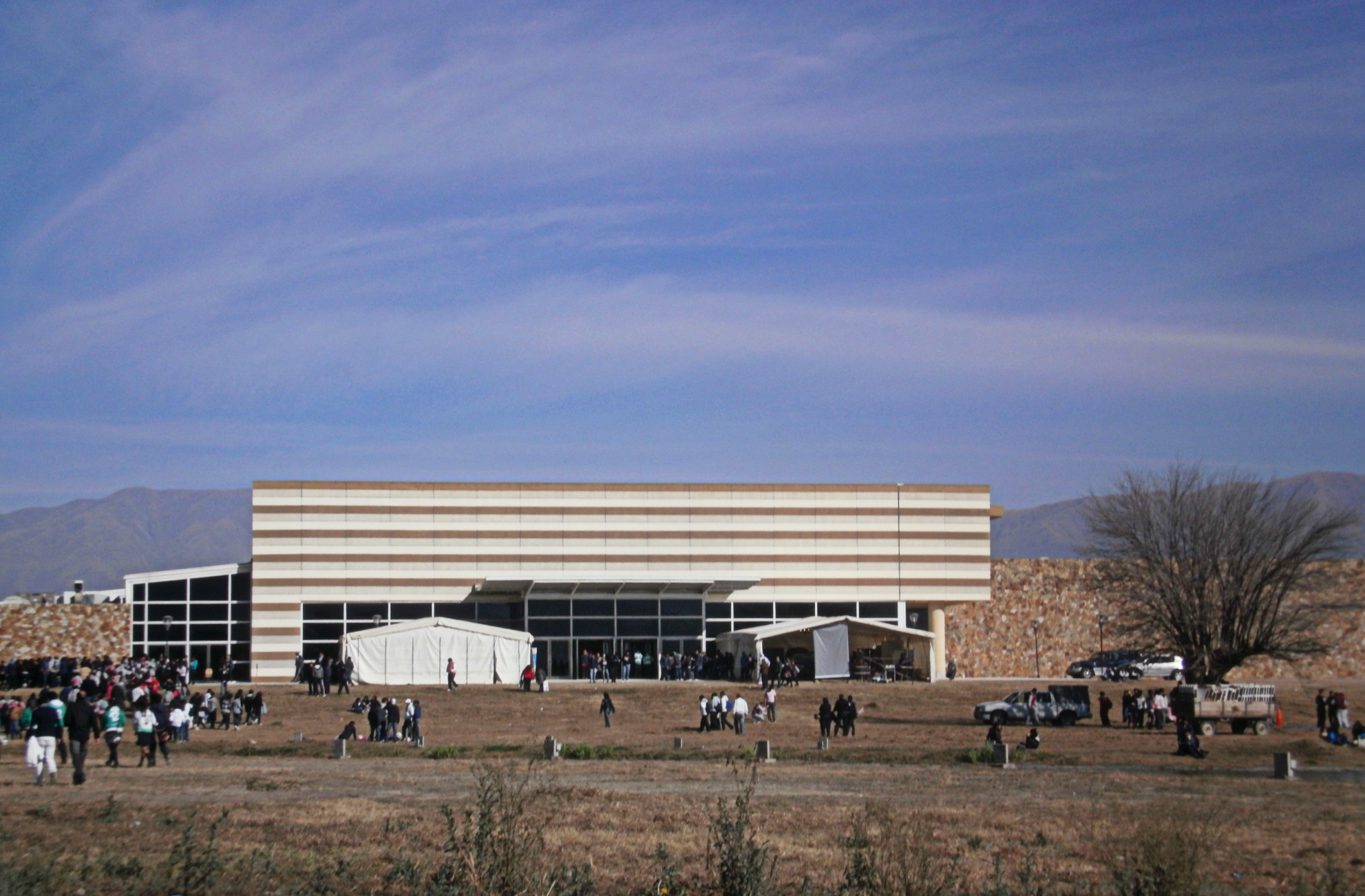 Centro de convenciones Limache durante la Expo-futuro 2012, tomada el 12 de julio.